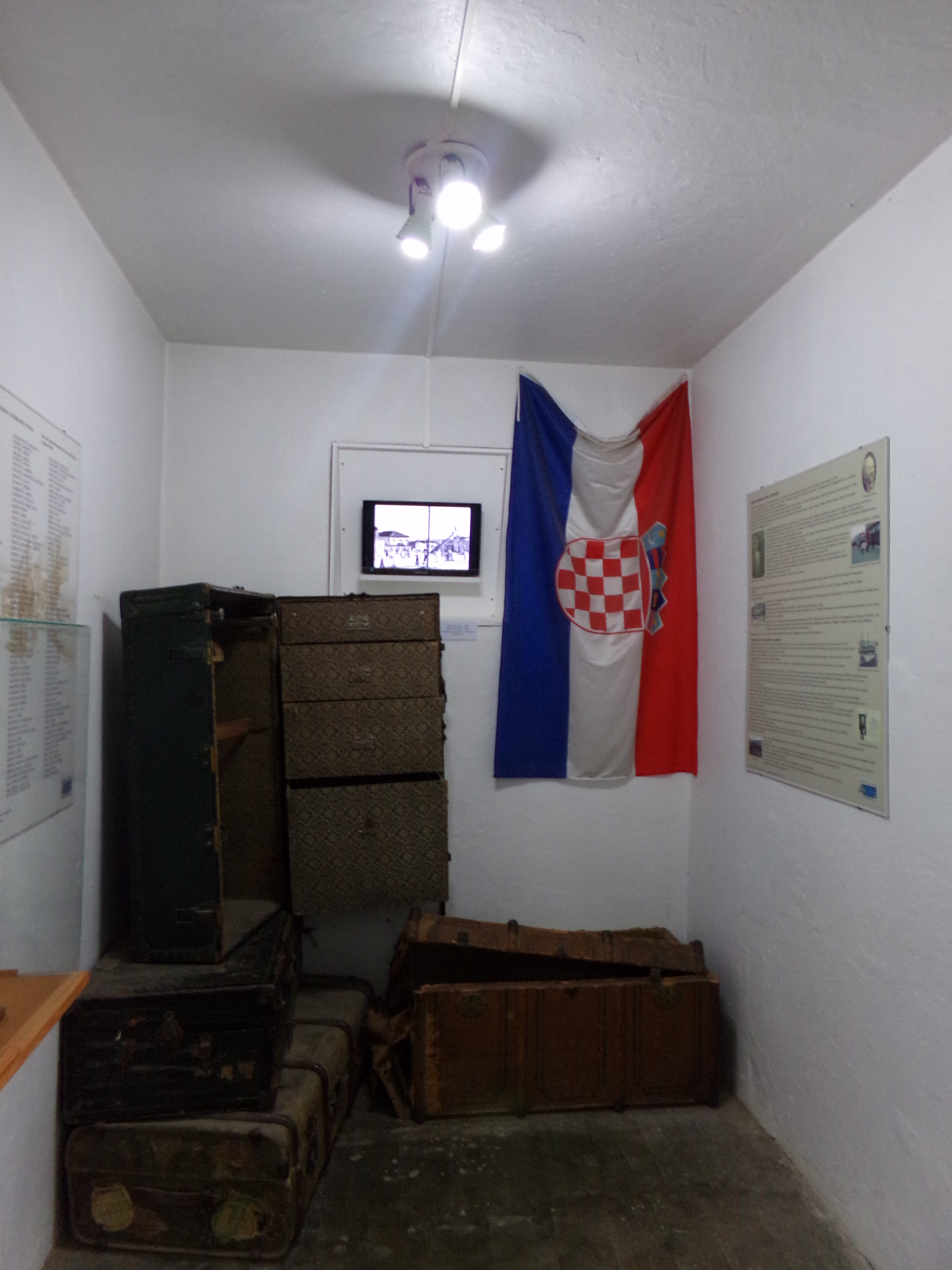 Museo Maritimo y Ex Presidio de Ushuaia, TDF, Arg